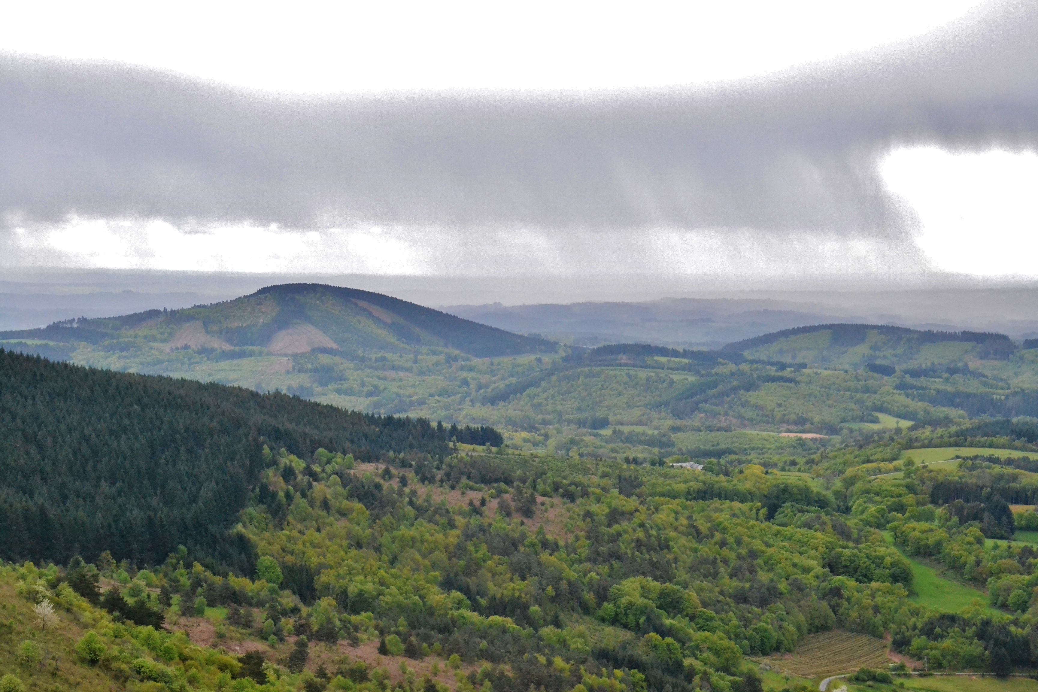 Le sud du massif des Monédières, vers Chaumeil, vu depuis le Suc-au-May (908 m.) (Corrèze, France)